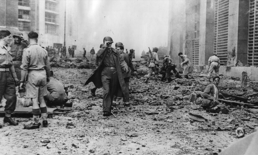 Il 7 ottobre 1943, verso le ore 12:00 a Napoli ci fu un massacro. I nazisti tedeschi, cacciati da Napoli il 1° ottobre dalla popolazione, piazzarono (responsabile fu la 3° Compagnia del 60° Battaglione Motorizzato Pionieri dell'Esercito tedesco) alcune mine ad alto potenziale ad orologeria nel Palazzo della Posta Centrale (nella parte Ovest dell'edificio... quello verso l'attuale Piazza Carità), dietro un falso muro sapientemente progettato nel seminterrato. Ci fu un tremendo scoppio... un massacro! I feriti furono 84 ed i morti furono 30. Tra i morti ci furono anche dei soldati statunitensi dei 2nd Army / Base Post Office e di Unità della Compagnia Servizi del 505th PIR Parachute Infantry Regiment dell'82nd Airborne Division dell'US Army, Divisione che aveva il proprio Comando a circa 300 metri nei locali della Questura. Il Palazzo delle Poste era stato preventivamente ispezionato dal 111th Engineer Regiment dell'US Army che lo ritenne sicuro. Il Tenente Sinclair del 43rd Bomb Disposal Section R.E. dell'US Army riferì che il complessivo dell'esplosivo doveva essere di circa 2000 libbre = oltre 900 kg e che nelle macerie furono trovati anche i resti dei governali di una bomba d'aereo tedesca da 250 kg.